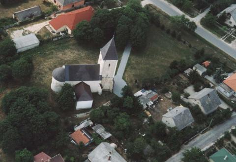 Szentkirályszabadja, Hungary, aerialphotography, Szent István király római katolikus templom